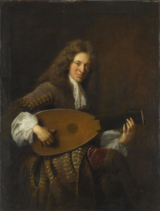 Portrait of French lutenist and composer Charles Mouton (ca. 1626-1699) by François de Troy. Musée du Louvre, Paris.